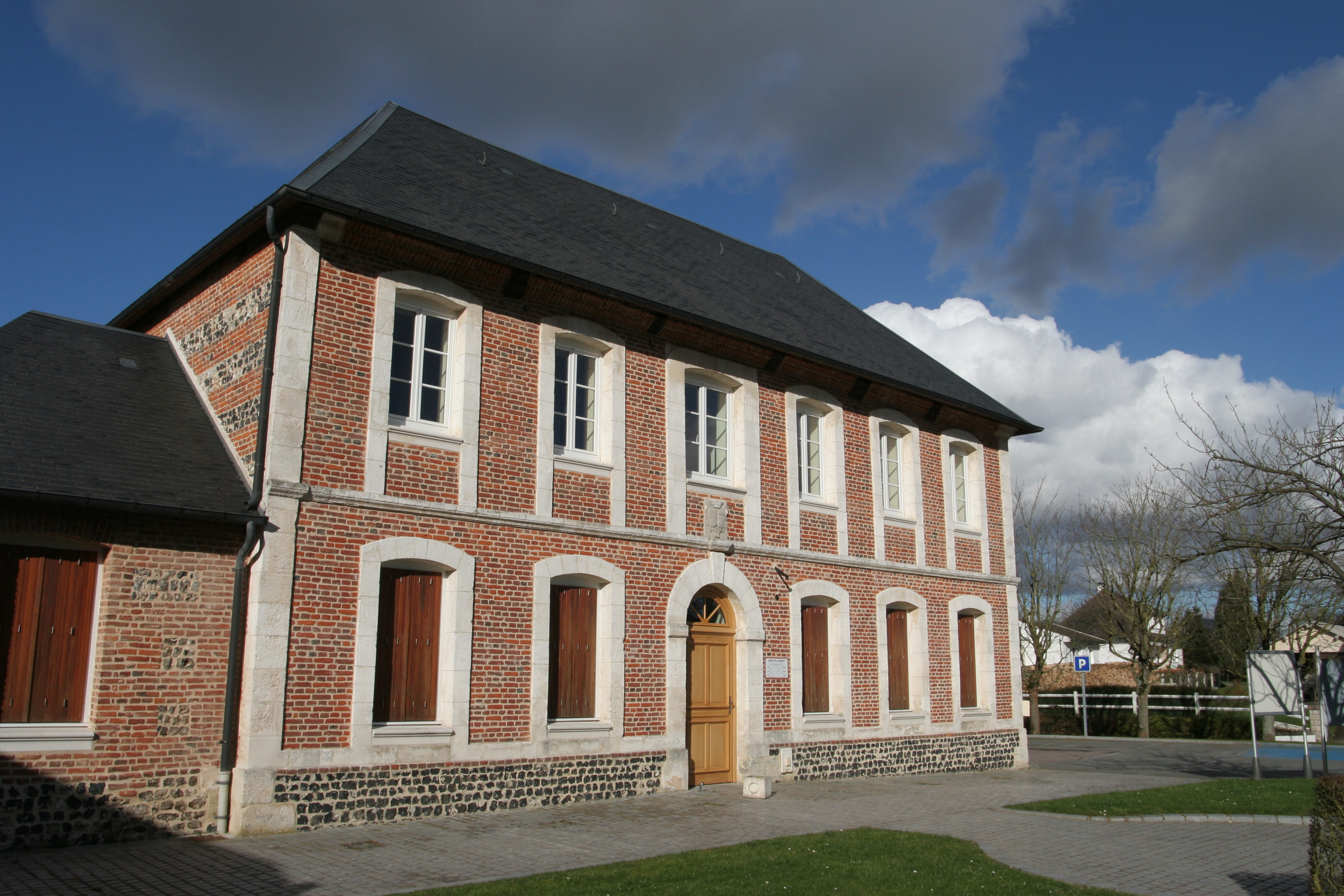 Mairie de La Remuée.